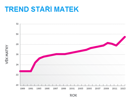 Graf stáří matek